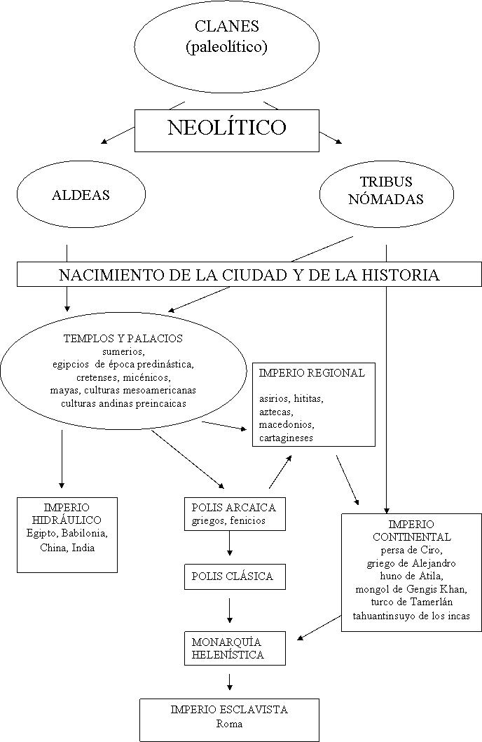 Cuadro sinóptico de la evolución de las civilizaciones antiguas